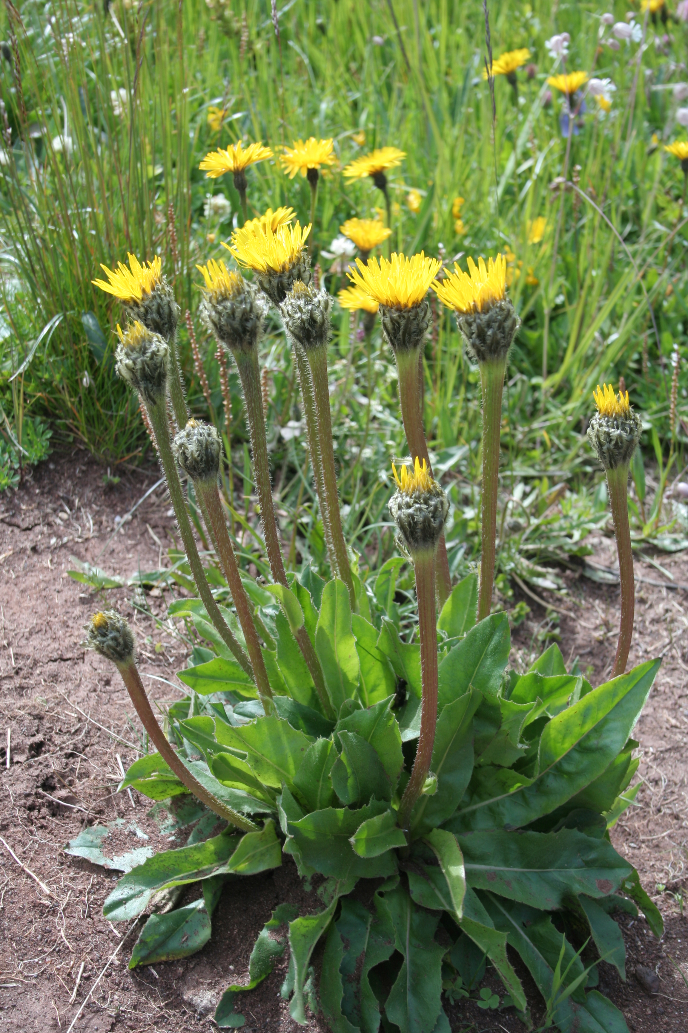 Hypochaeris_uniflora (Costolina alpina) Località : Passo di Falzarego, Cortina (BL), 2105 m s.l.m.